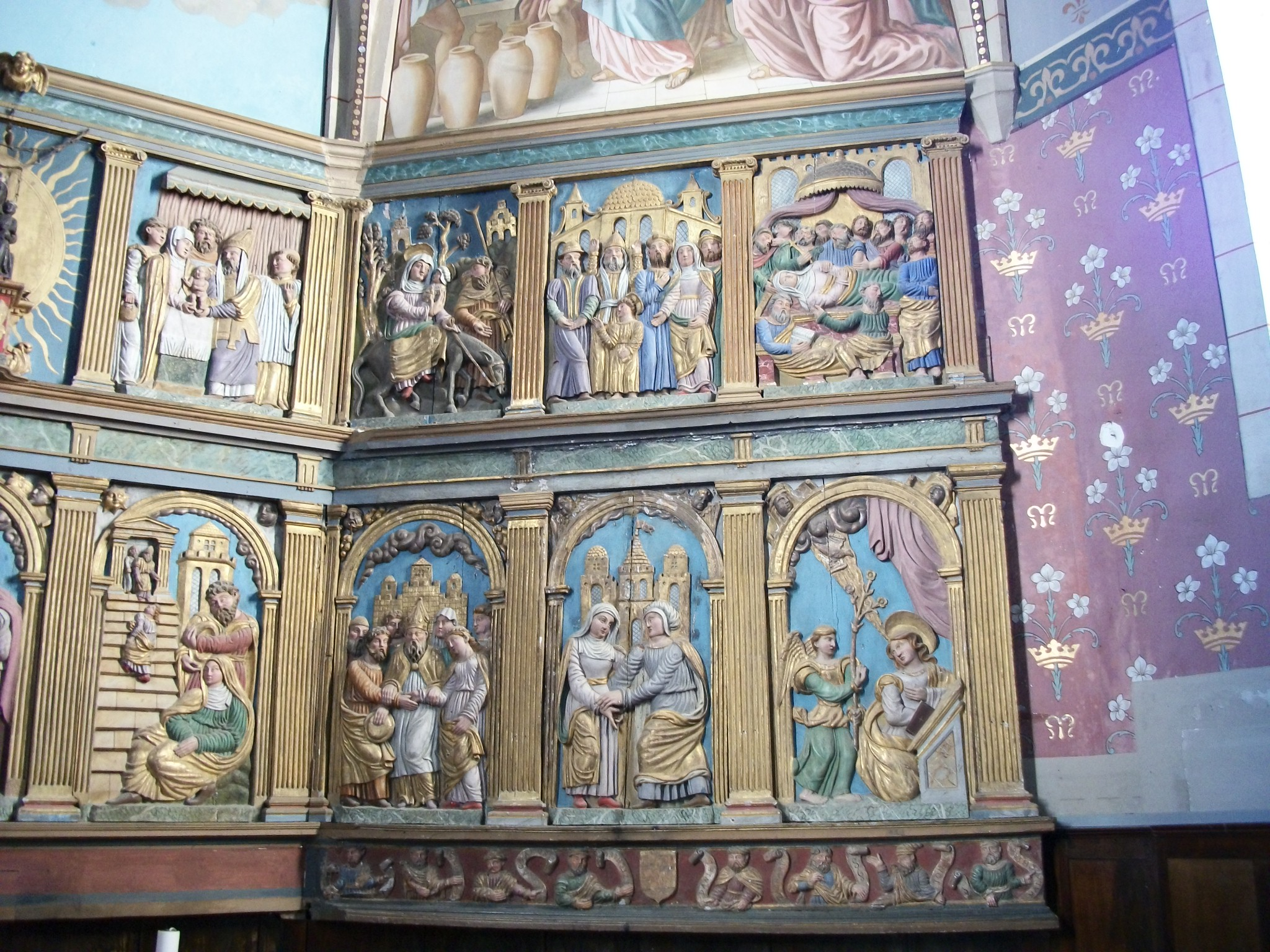 Le panneau droit du retable